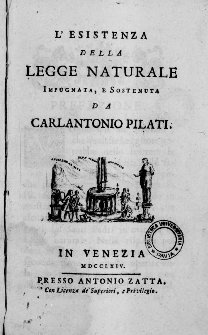 Frontespizio